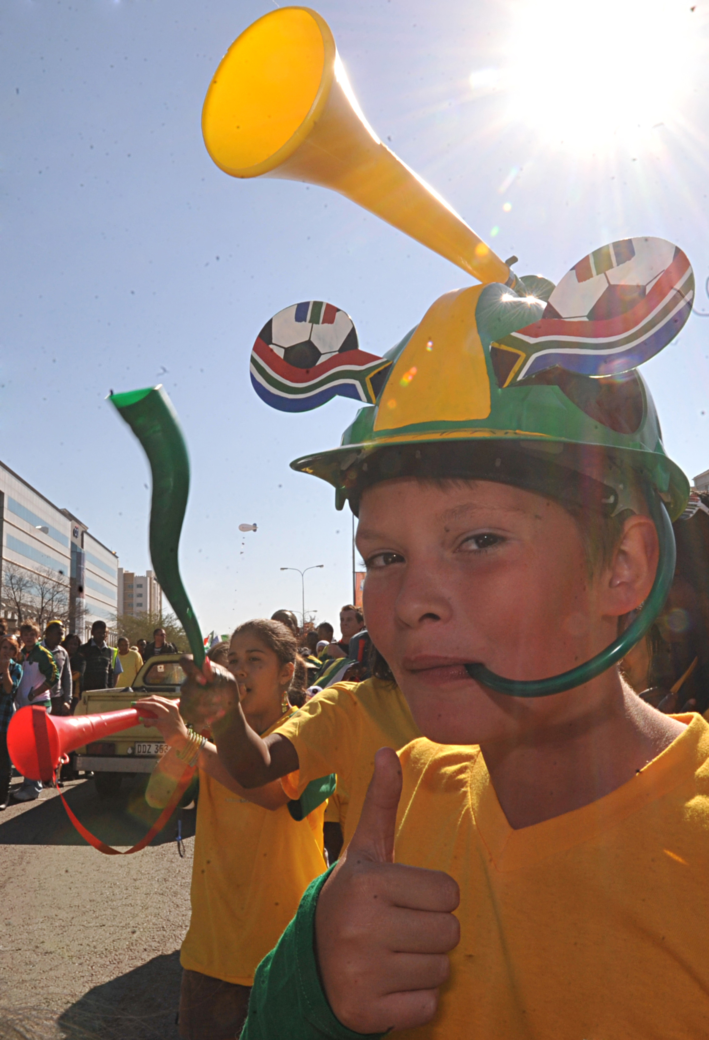 Johannesburgo - A dois dias de estrear na Copa do Mundo, a anfitriã África do Sul promoveu uma linda festa nas ruas da cidade, dezenas de pessoas foram às ruas acompanhar o desfile em carro aberto da seleção nacional, ao som ensurdecedor das vuvuzelas, os sul-africanos prestigiaram os jogadores pelas ruas da capital.